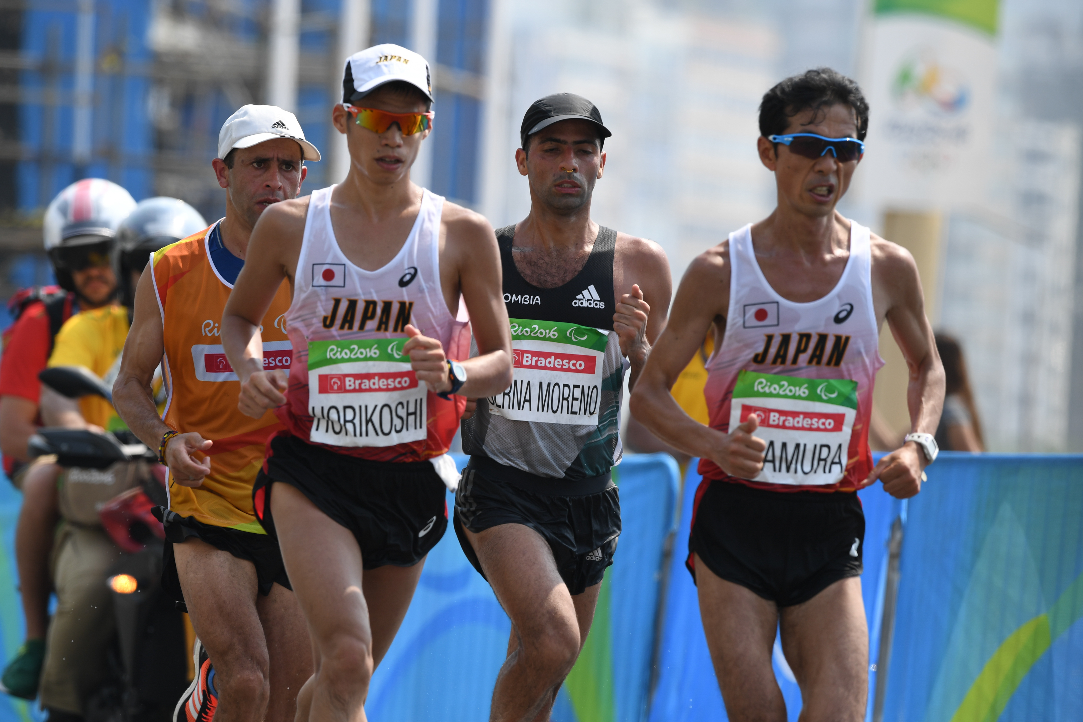 Rio de Janeiro - Maratona Paralímpica T12 e T46 na praia de Copacabana (Tânia Rêgo/Agência Brasil)